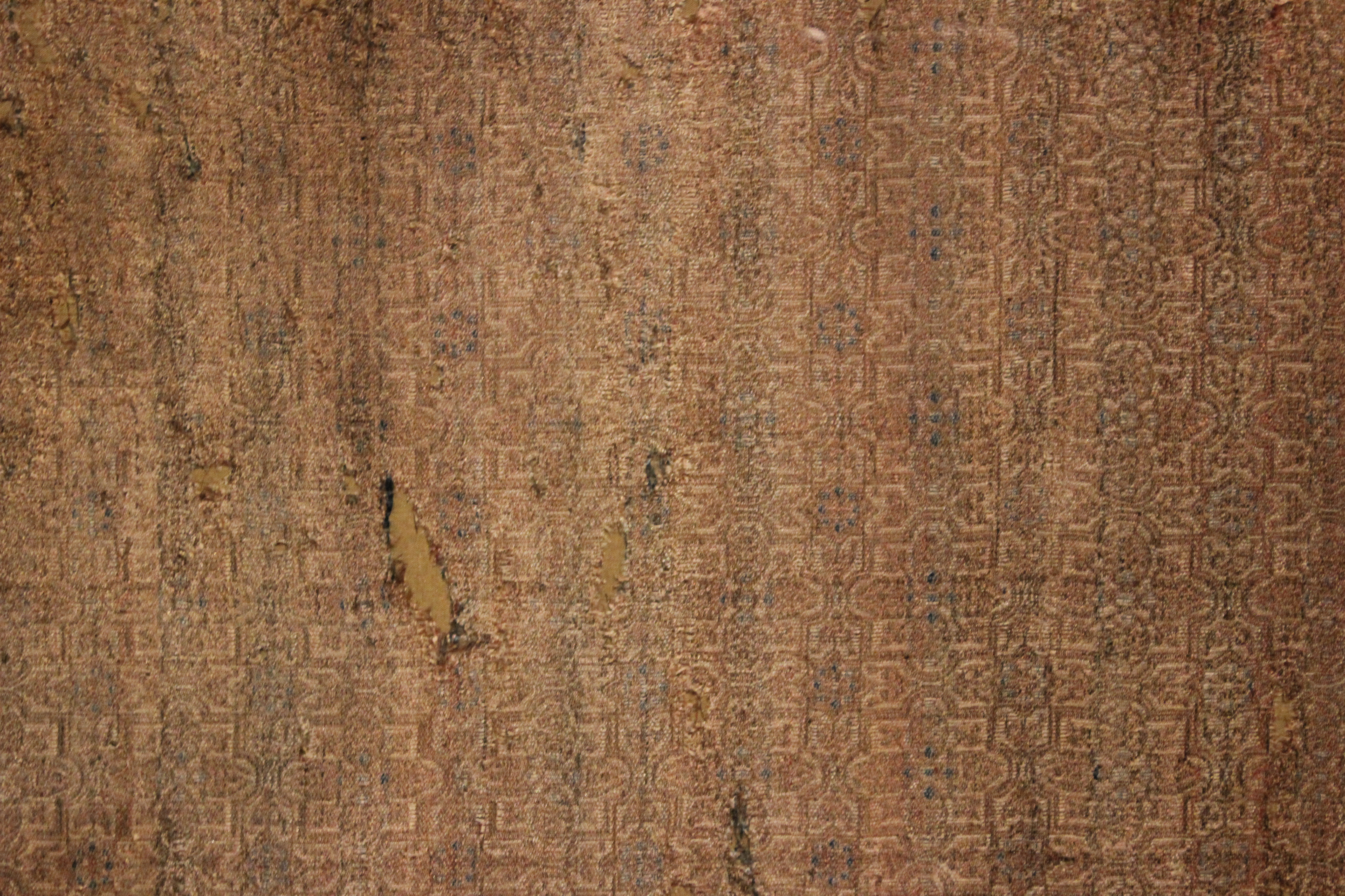 Capa del infante Felipe de Castilla (1231-1274), que fue hijo del rey Fernando III de Castilla y de la reina Beatriz de Suabia. La capa, que actualmente se conserva en el Museo Arqueológico Nacional, data de finales del siglo XIII, y procede del sepulcro del infante, que está situado en la iglesia de Santa María la Blanca de Villalcázar de Sirga.